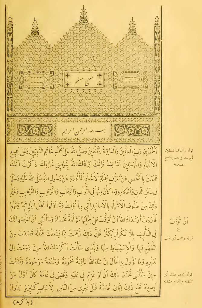 تصنيف:كتب الحديث تصنيف:كتب أهل السنة والجماعة تصنيف:أغلفة كتب